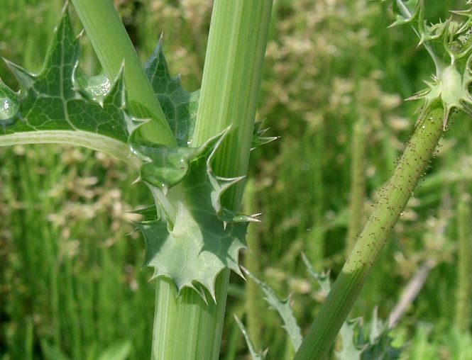 Sonchus asper, Osaka-fu Japan